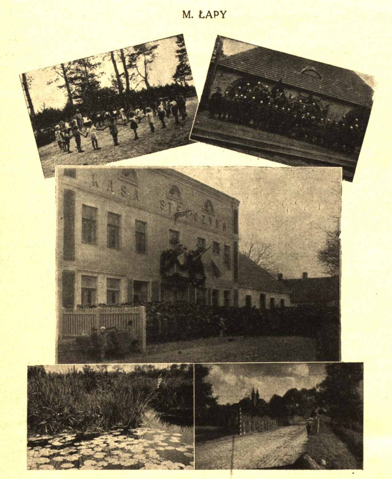 Góra z lewej: półkolonia letnia w okolicy miasta, z prawej: kolejowa straż pożarna przed remizą. W środku: wspaniały gmach Kasy Stefczyka. Dołem z lewej: malowniczy fragment nieuregulowanej rzeki Narew koło Łap, z prawej: fragment szosy łączącej m. Łapy z szosą białostocką.